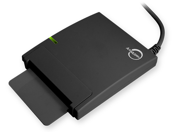 Смарт-карт ридер JCR721 в чёрном цвете